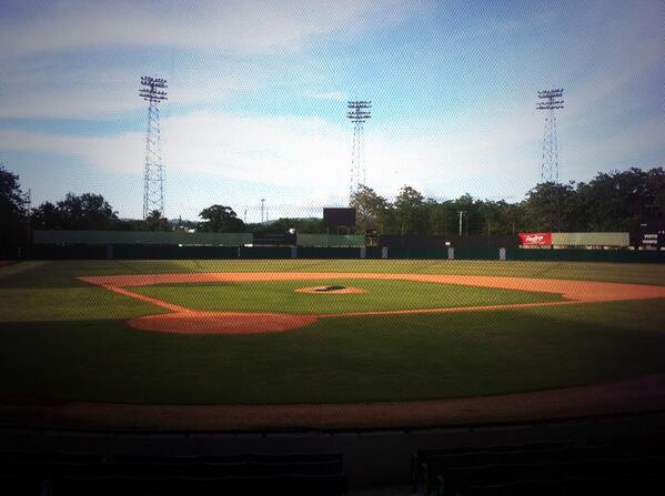 Estadios Julian Javier